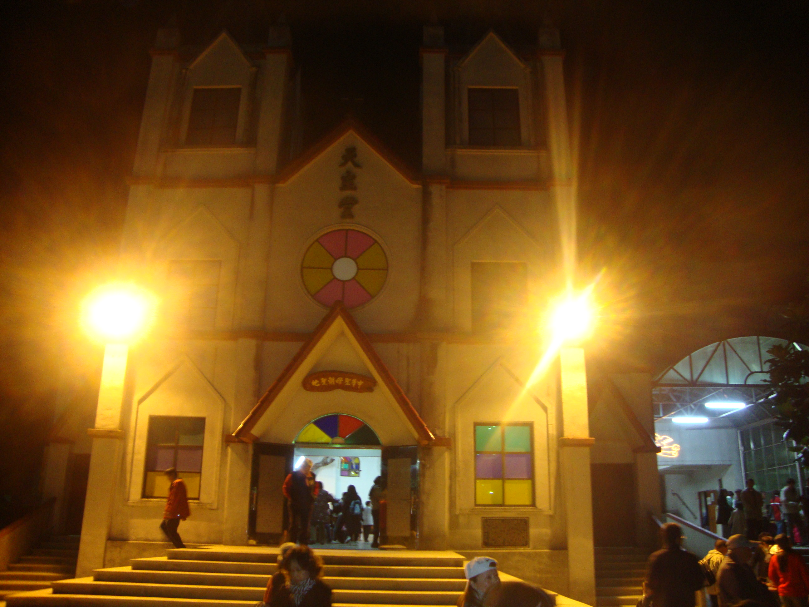 主曆2011年1月1日攝於梅山中華聖母堂